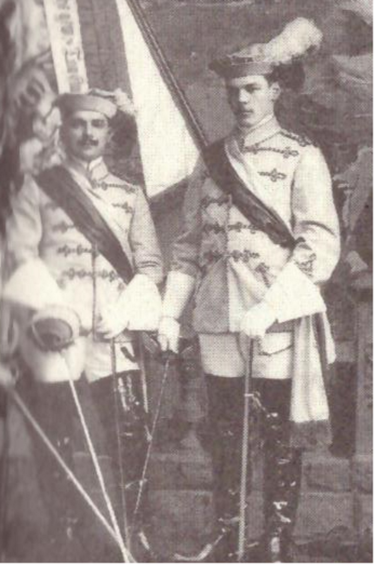 Wilhelm Zorn als Senior Donariae